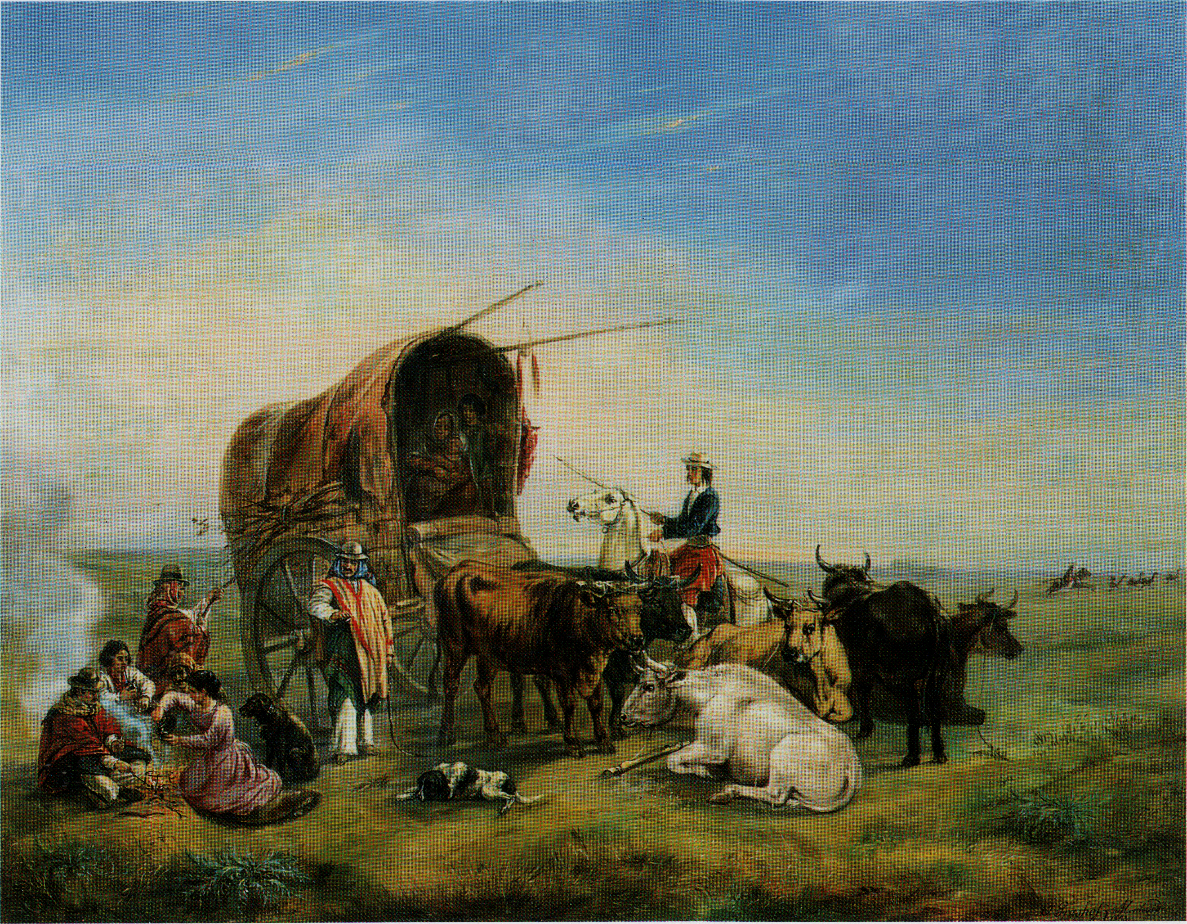 Pintura "Parada en el campo" del pintor alemán Otto E. F. Grashof.